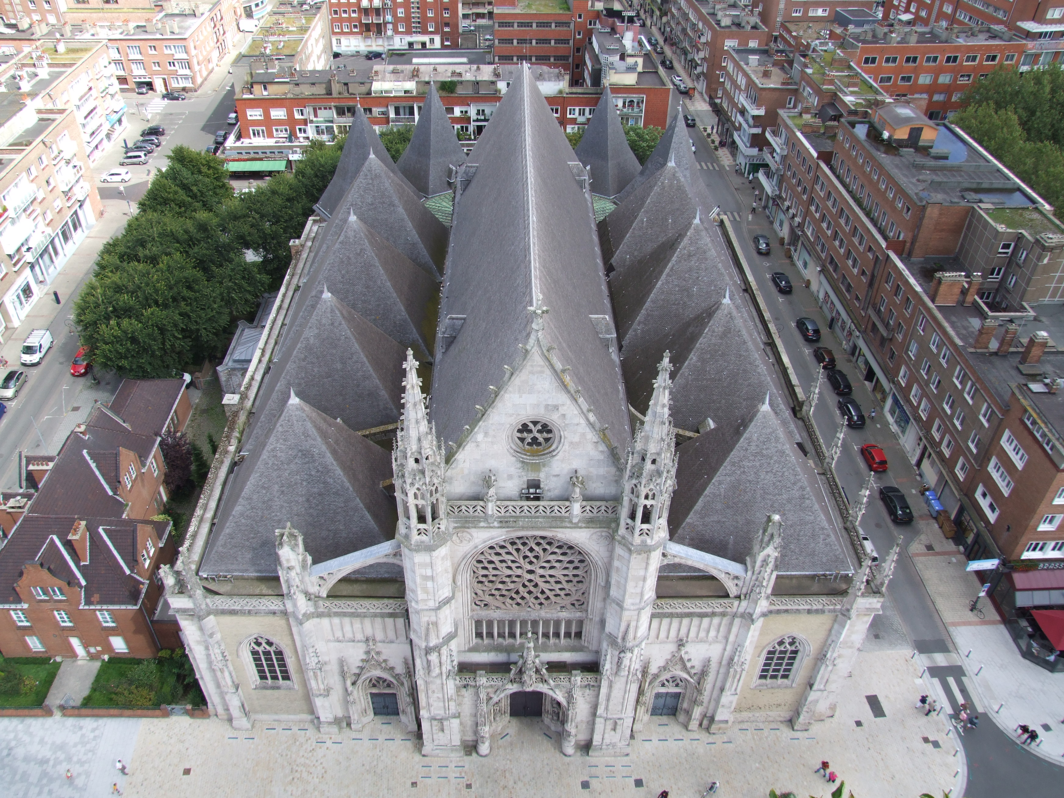 Beffroi de Dunkerque - Saint Eloi von Belfried von Dünkirchen aus gesehen.